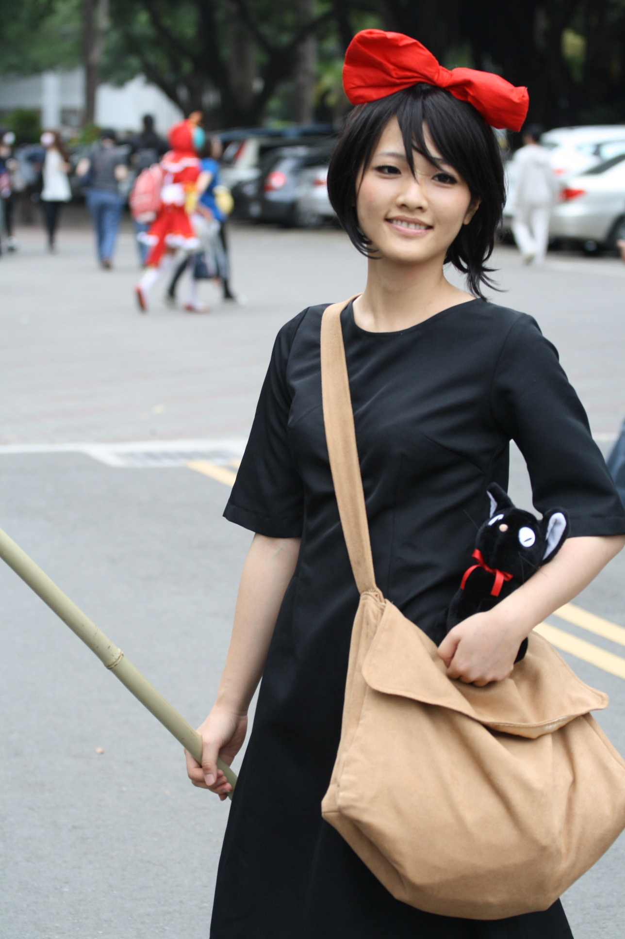 日輪月in成大，《魔女宅急便》琪琪cosplayer。